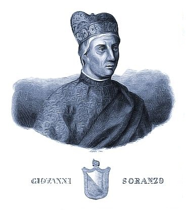 Портрет дожа Джованни Соранцо